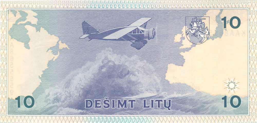 Lithuania 10 litu 1993